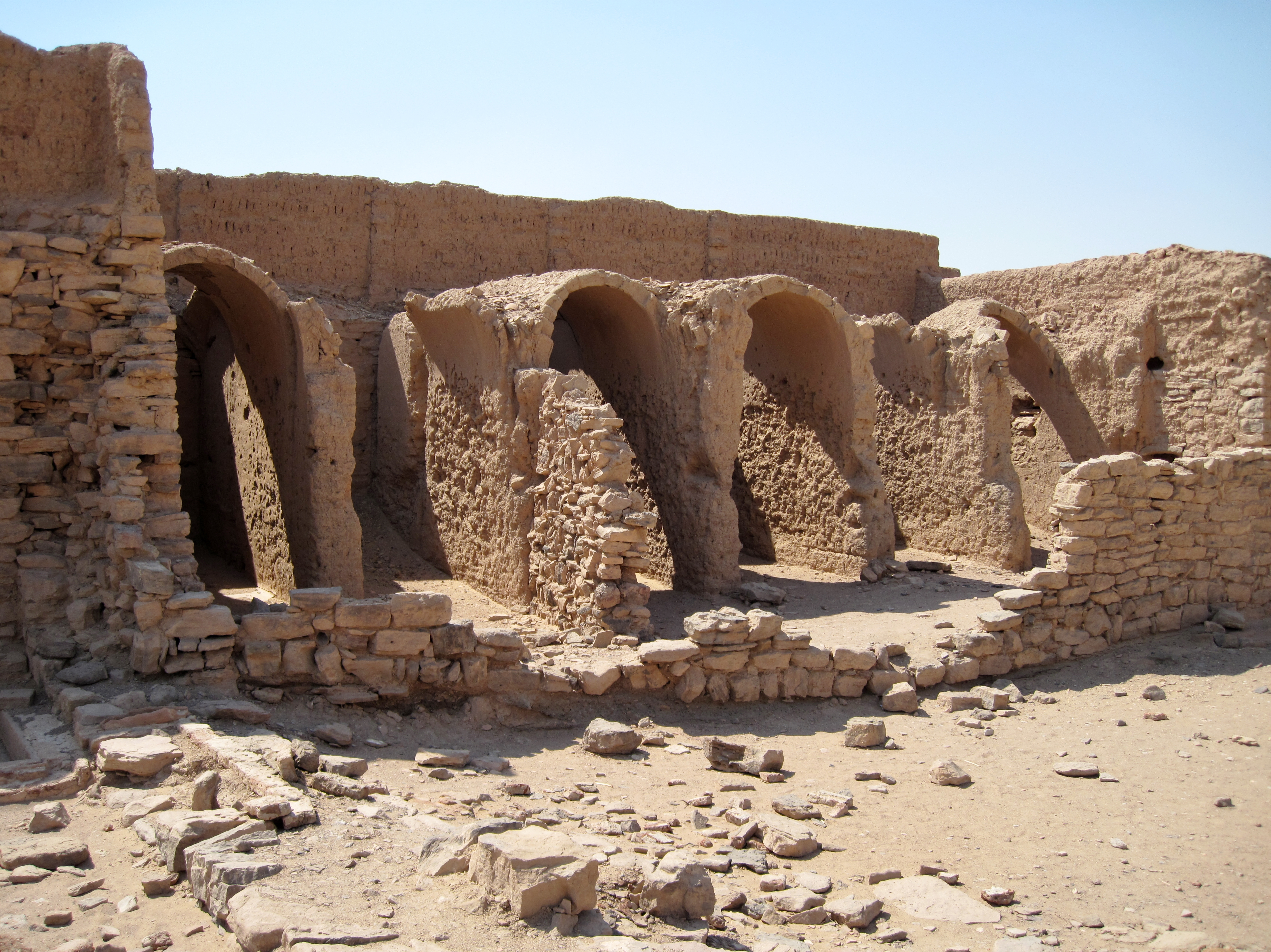 Simeonskloster (Deir Amba Samaan) westlich des Nils in Assuan, Ägypten